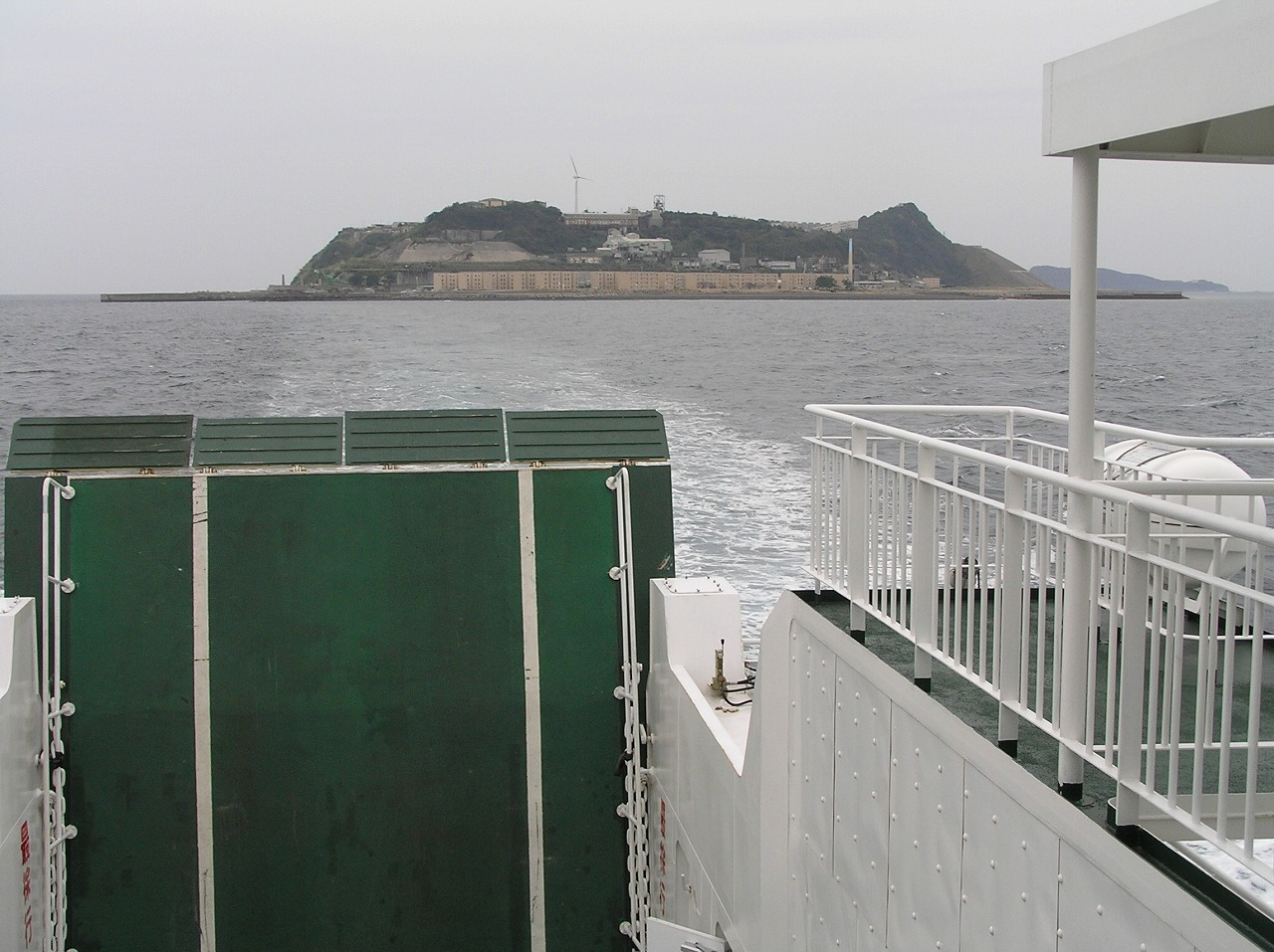 フェリーから見る池島